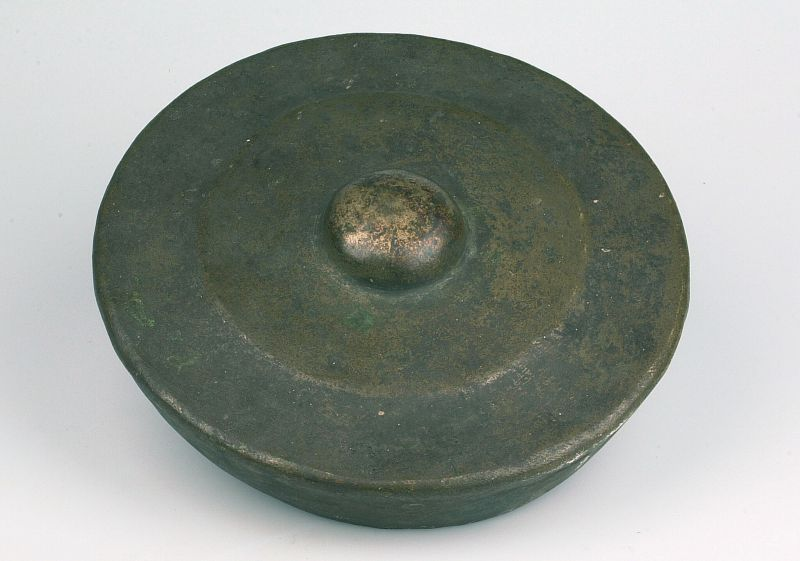 Slaginstrument. Gong Unknown language: Ogoeng doal